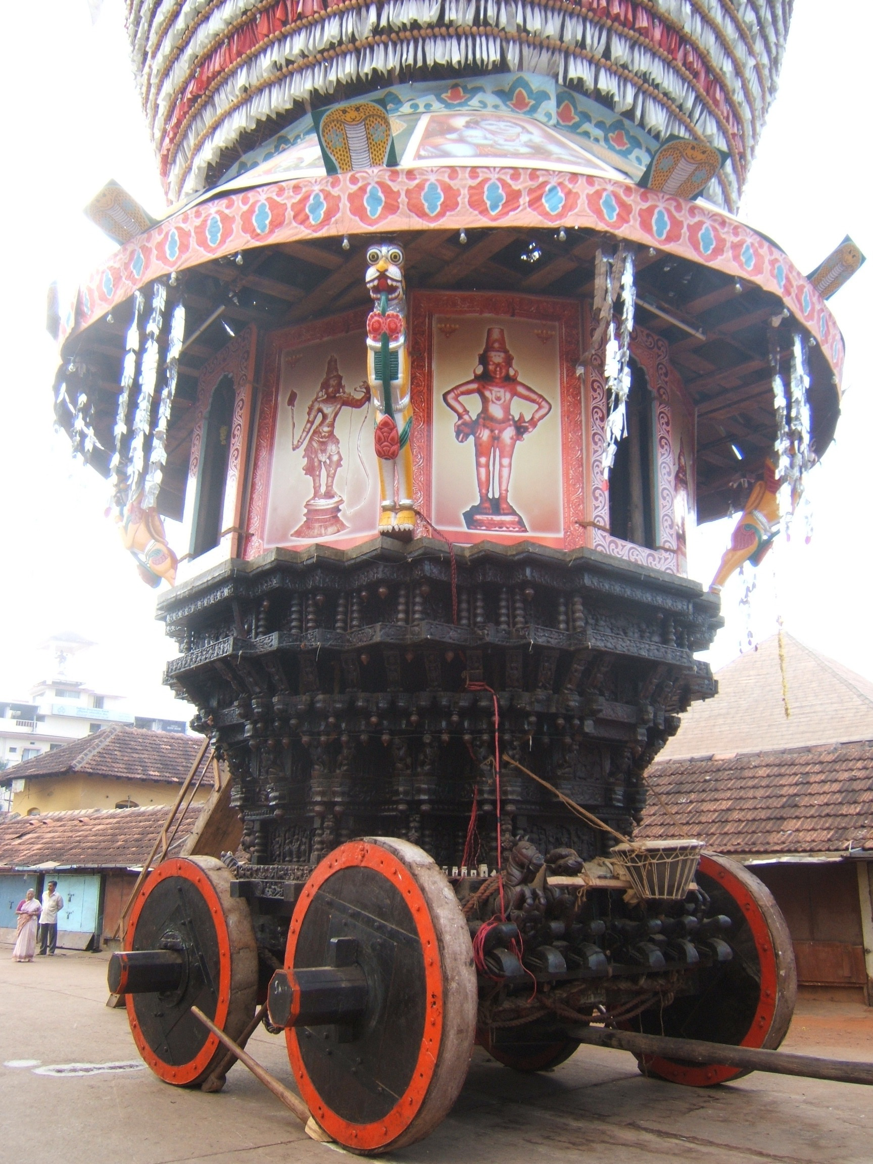 Udupi, Karnataka